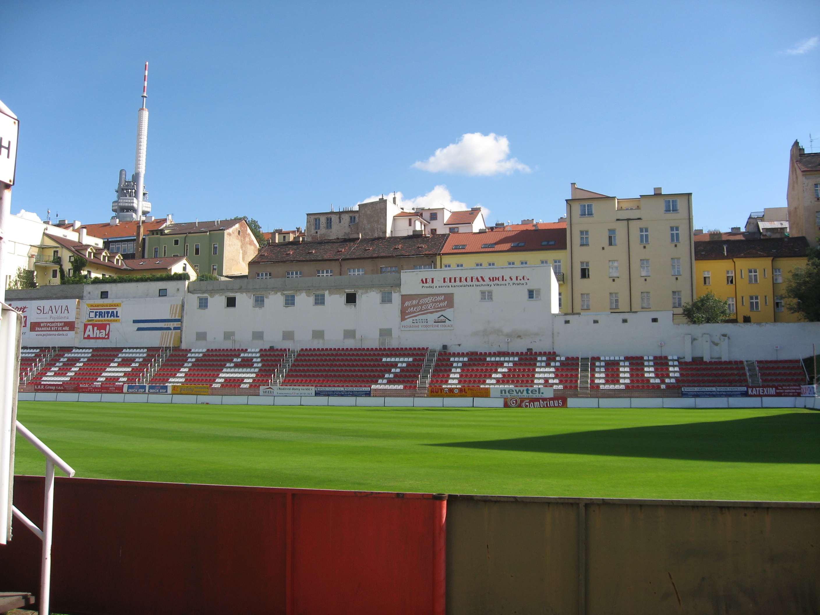 Stadion Viktorky Žižkov, část tribuny protilehlé k hlavní tribuně